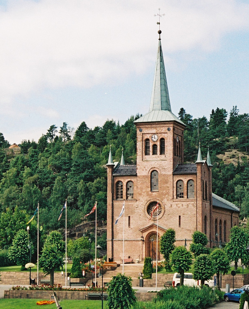 Svelvik kirke, Vestfold.